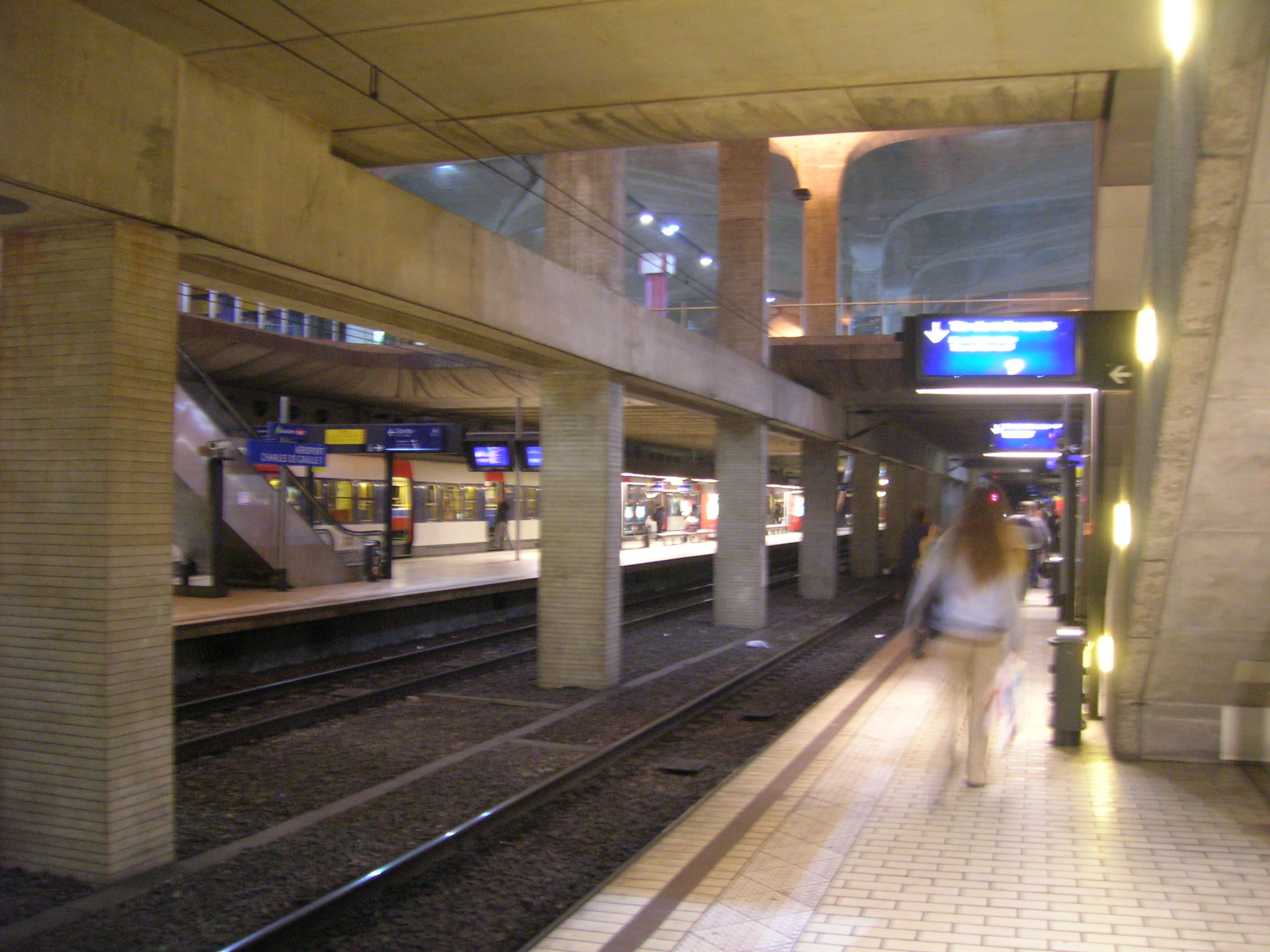 Gare aéroport CDG 1, Île-de-France